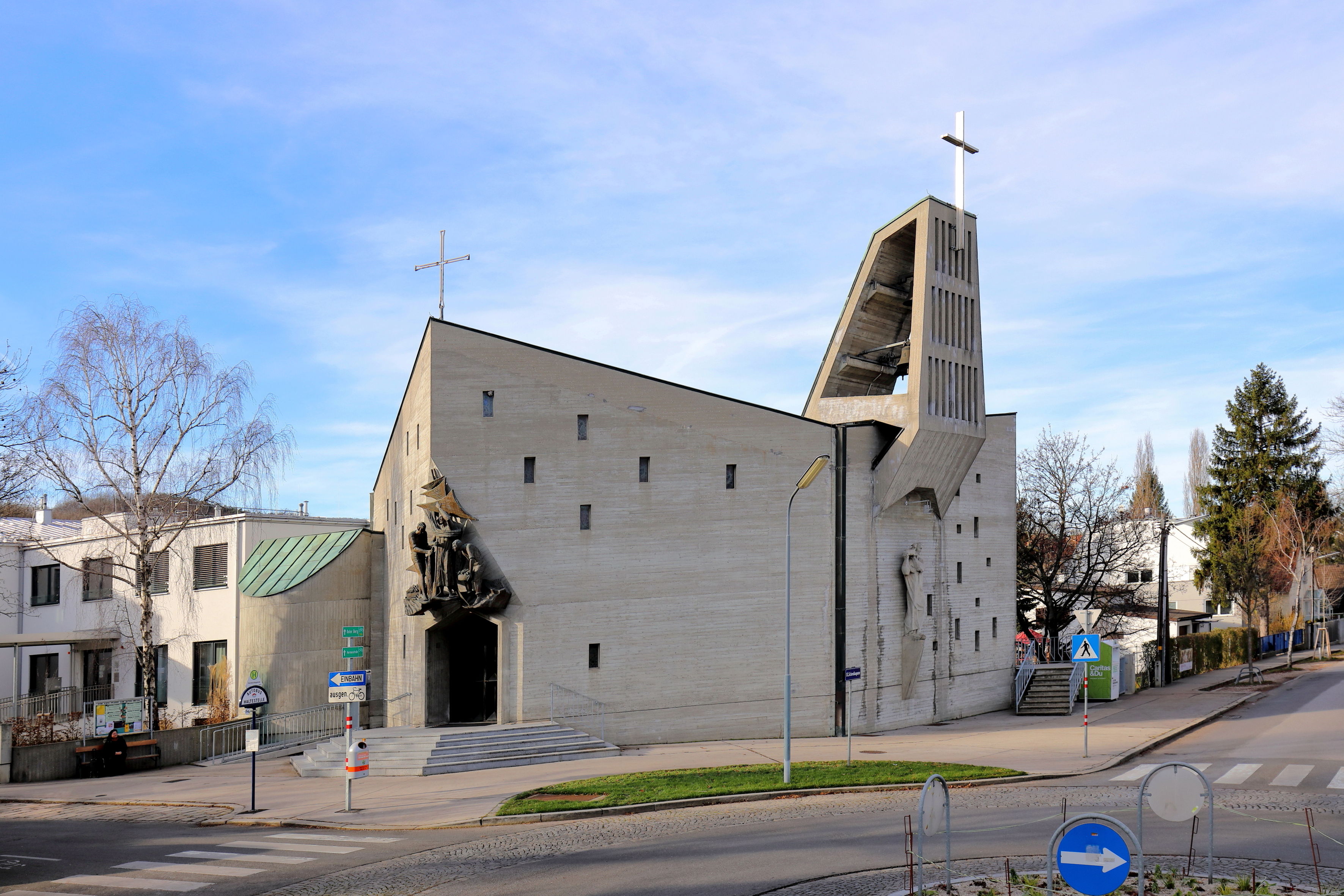 Südostansicht der Pfarrkirche Zum Guten Hirten in der Bossigasse im 13. Wiener Bezirk Hietzing.Die Kirche wurde ab 1963 nach Plänen des Architektenpaares Ceno und Herta Kosak errichtet und am 19. September 1965 geweiht. Über dem Haupteingang befindet sich die Bronzeplastik Der Fischfang, ein Werk vom italienischen Bildhauer Gianluigi Giudici aus dem Jahr 1992.